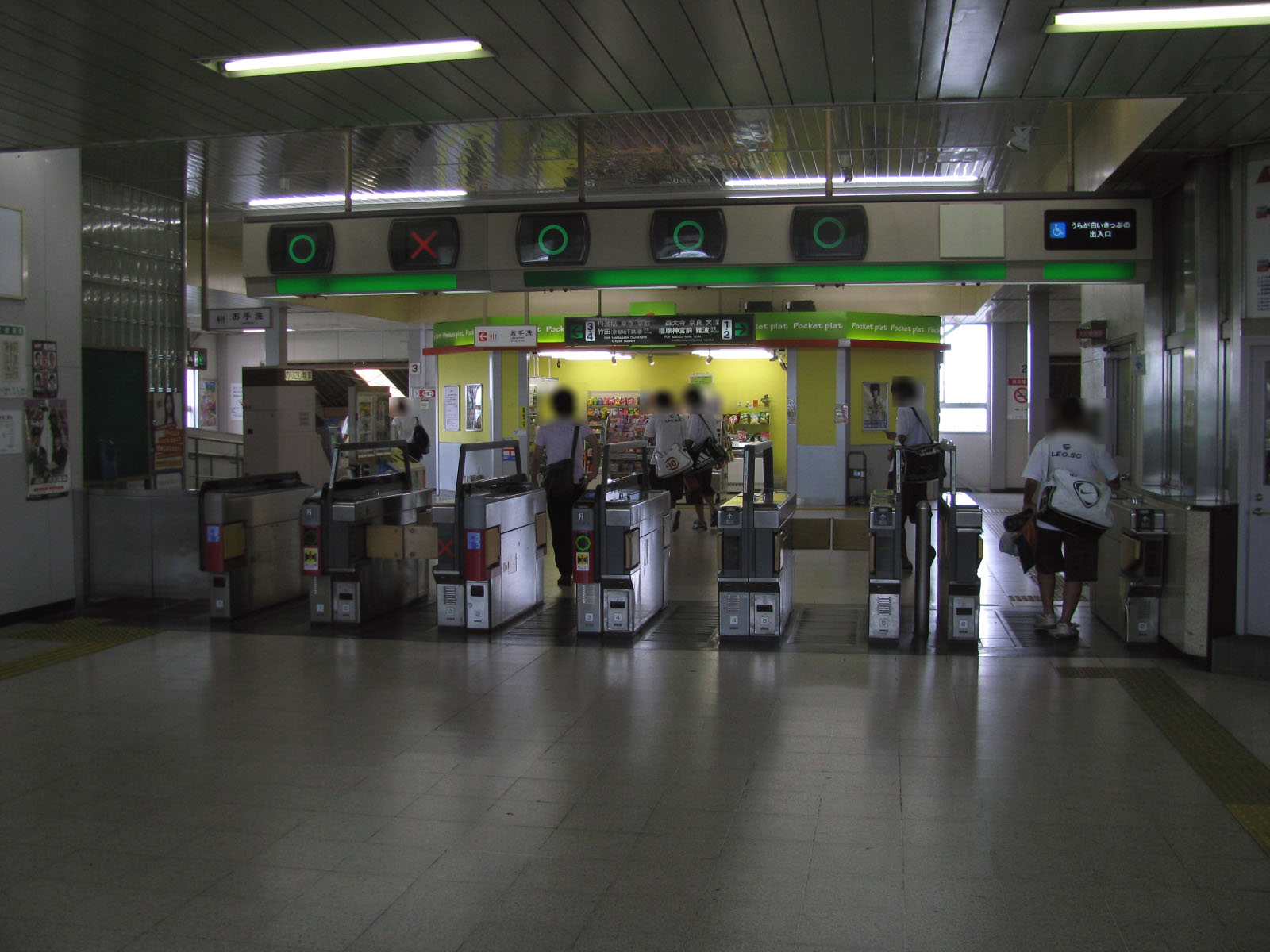 近鉄京都線向島駅